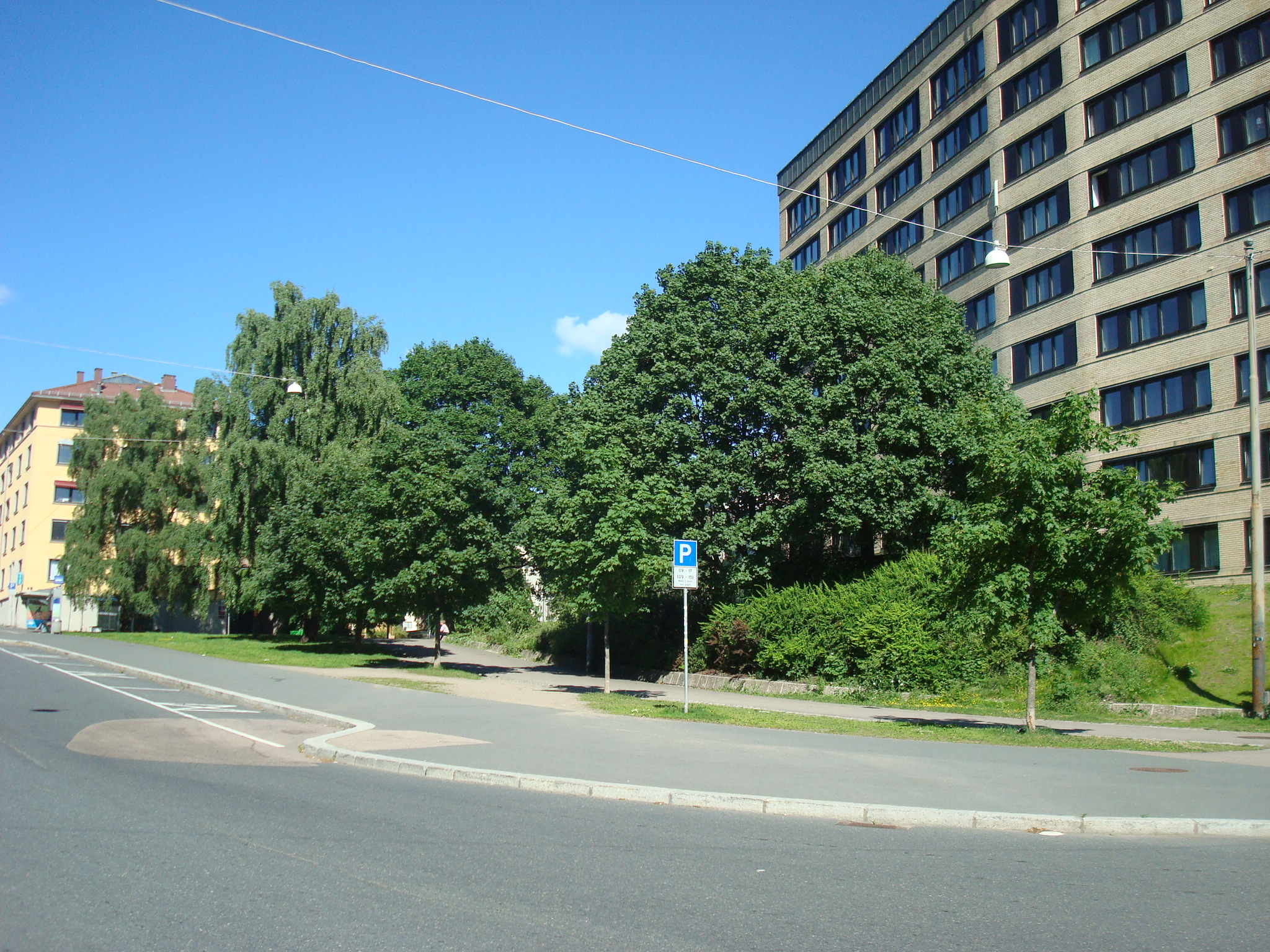 Kirsten Hansteens plass i Oslo.